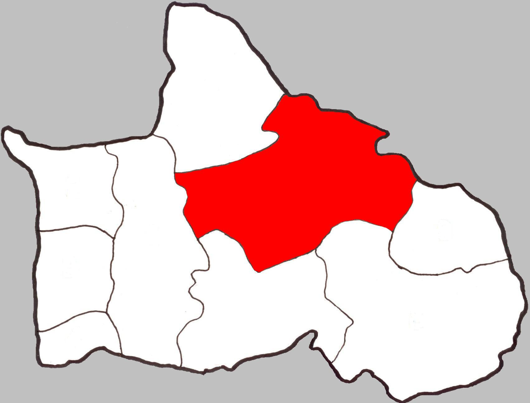 Map of Tambon Nakhon Pa Mak, Bang Krathum, Phitsanulok, Thailand